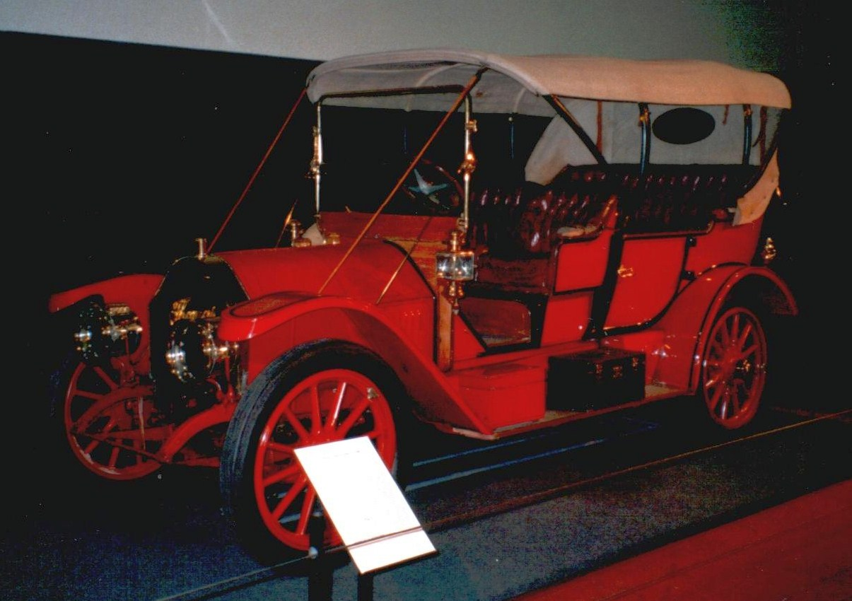 Thomas Flyer von 1910 im Louwman Museum.